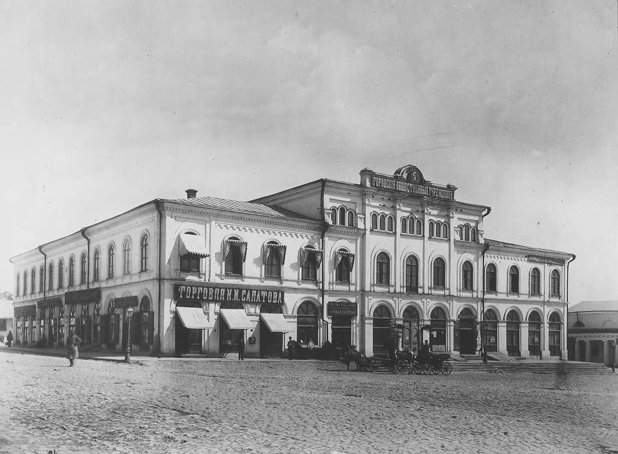 Ростовская Городская Управа (дом Максимова).